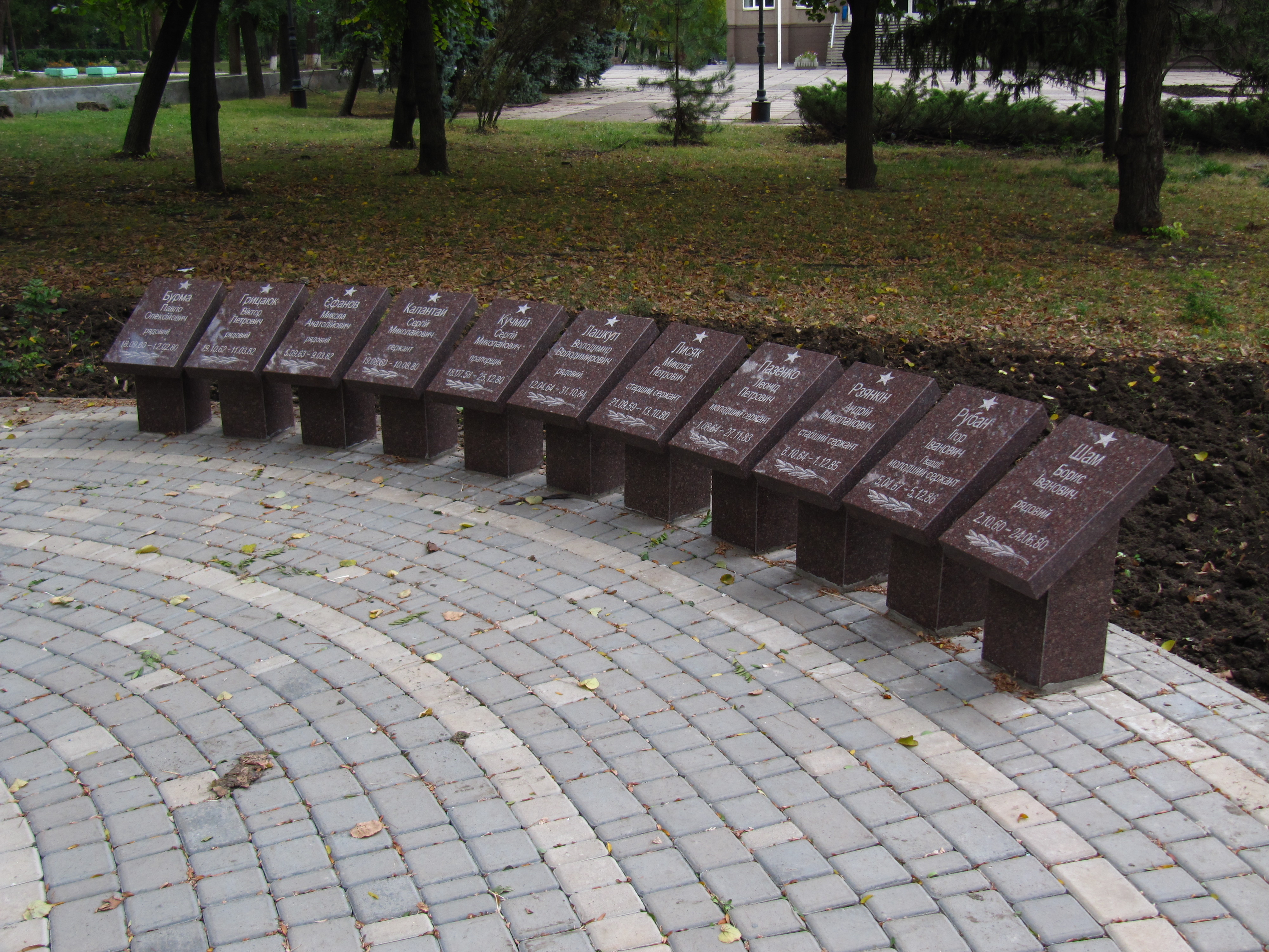 Пам'ятник воїнам-інтернаціоналістам у сквері на вул.Шурупова, що на КРЕСі, у м.Кривий Ріг. Поряд з табличками розташовано пам'ятник File:Пам'ятник воїнам-інтернаціоналістам на КРЕСі 01.JPG. Пам'ятка не входить до офіційного охоронного реєстру.